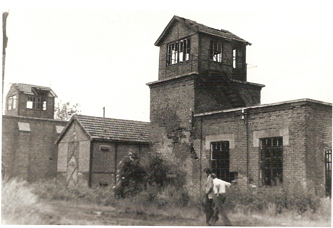 La Fosse n° 4 - 4 bis de la Compagnie des mines de l'Escarpelle était un charbonnage constitué de deux puits situé à Douai (Dorignies), Nord, Nord-Pas-de-Calais, France.